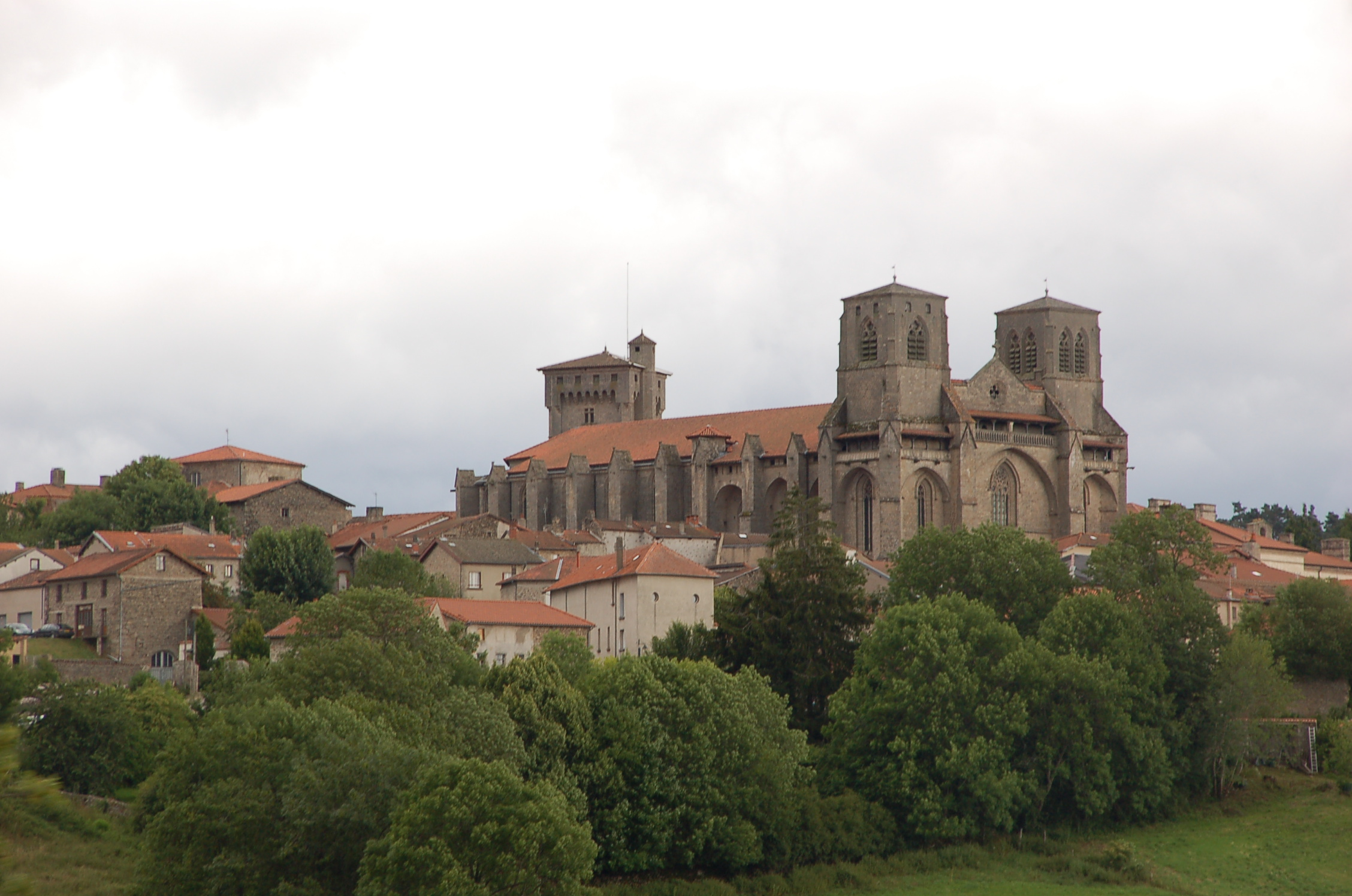 Abbatiale Saint-Robert de la Chaise-Dieu